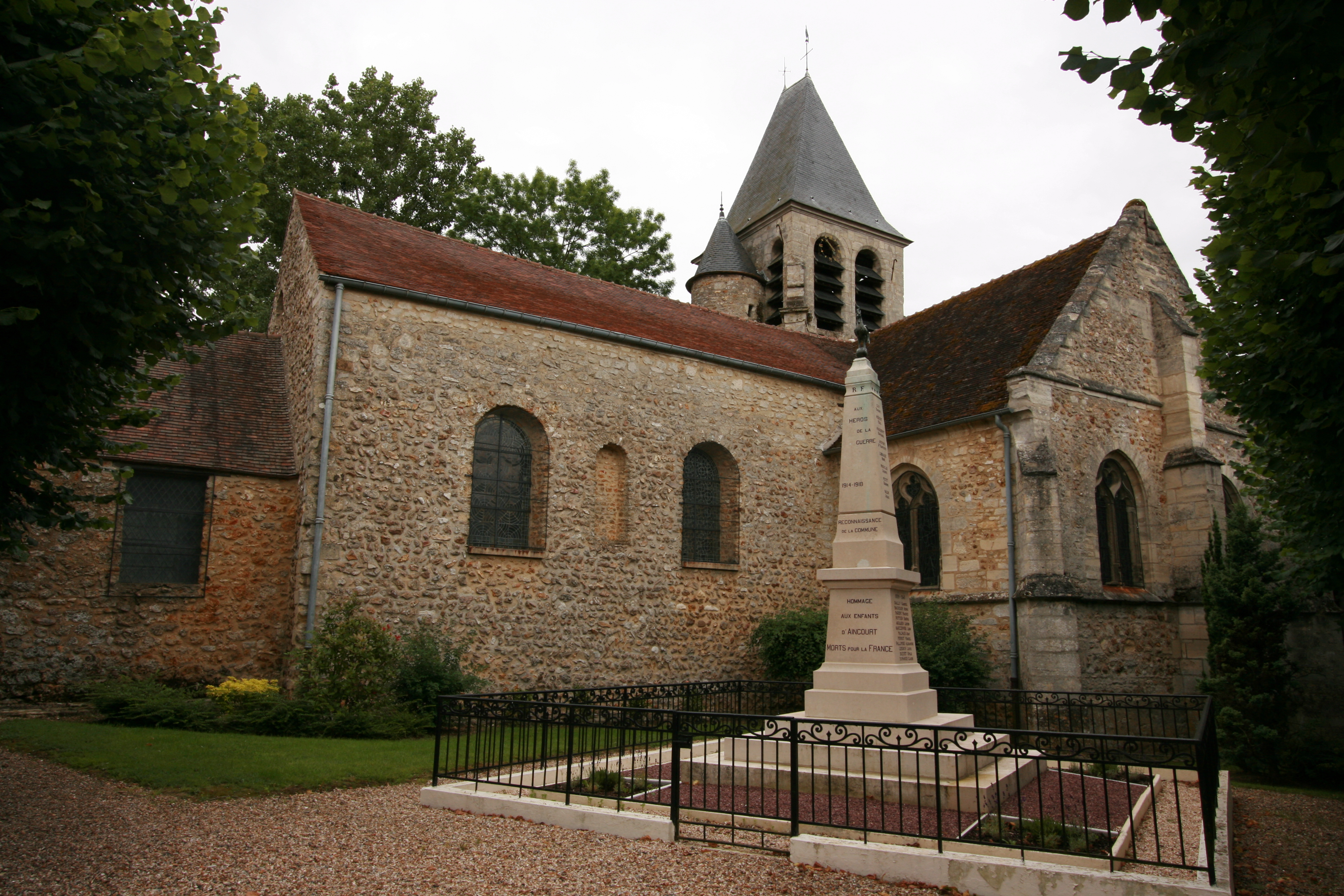 Eglise Saint-Martin d'Aincourt, dans le Val d'Oise. Partie romane du XIIe siècle pour la nef, et du XVIème sicle pour le choeur, le transept, le clocher et la tourelle. Monument aux morts au premier plan, vue ouest Unknown church saint-martin, in aincourt, val d'oise, france. nave dates back to the xiith century, transept, chancel and tower to xvith century. west view